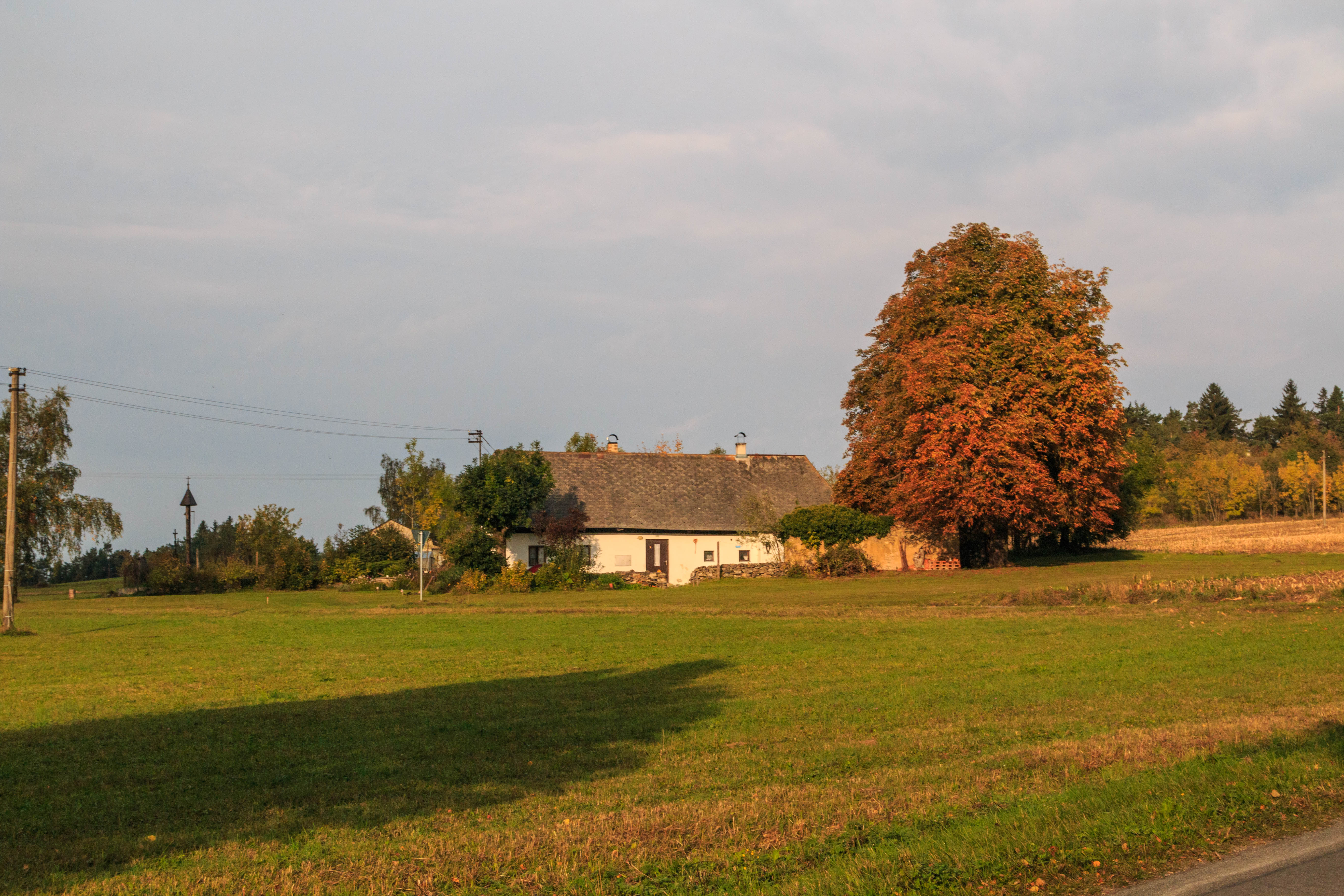 Nedvídkov - čp. 29